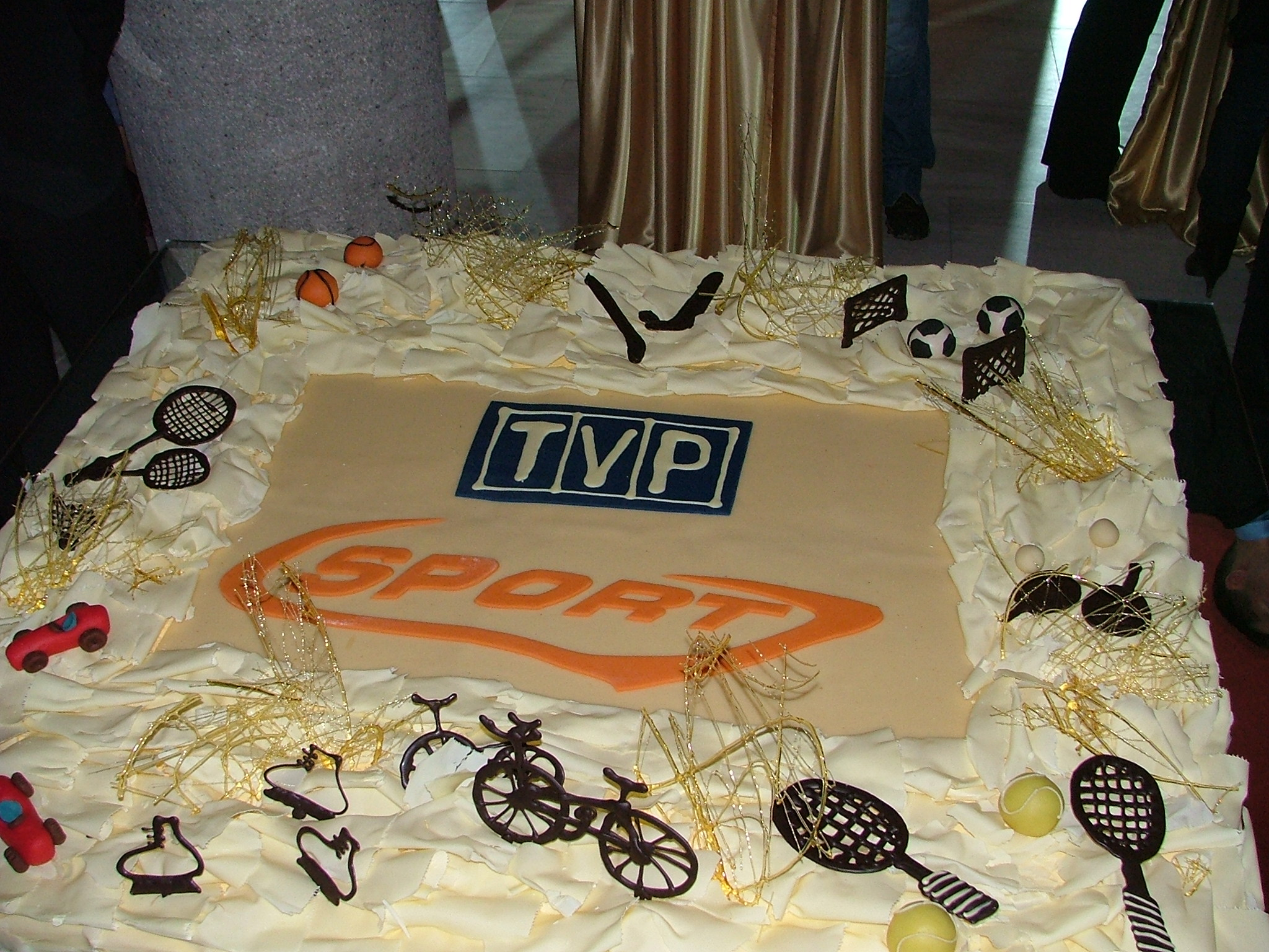 Impreza z okazji 1. urodzin TVP Sport, Warszawa, Centrum Olimpijskie